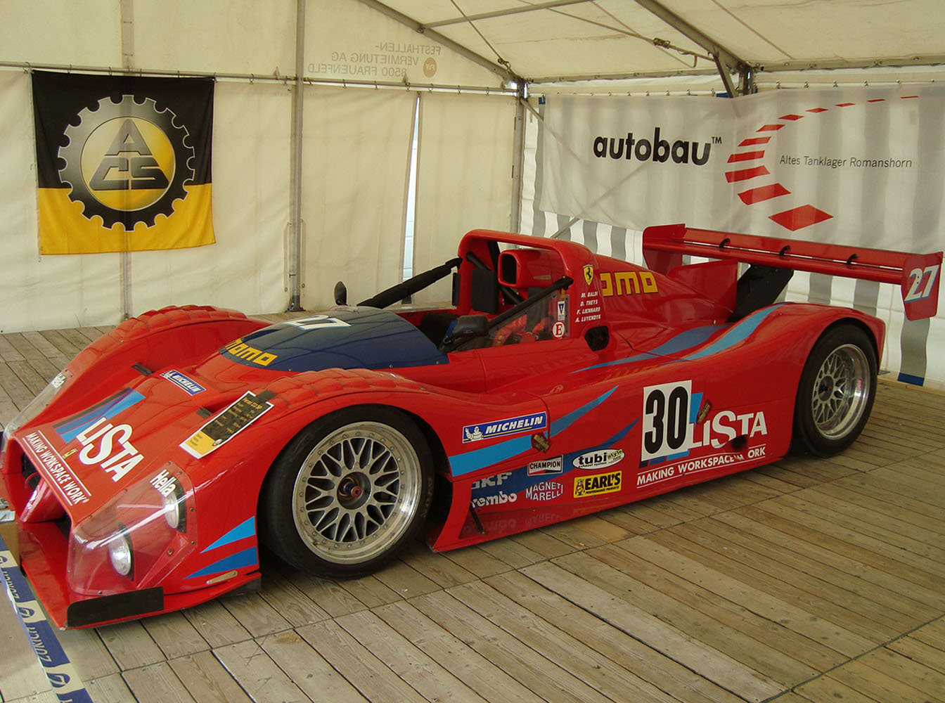 Ferrari 333 SP, Fredy Lienhard, Mauro Baldi, Didier Theys, Arie Luyendyk, Sportwagen-Prototyp, Lista Racing Team